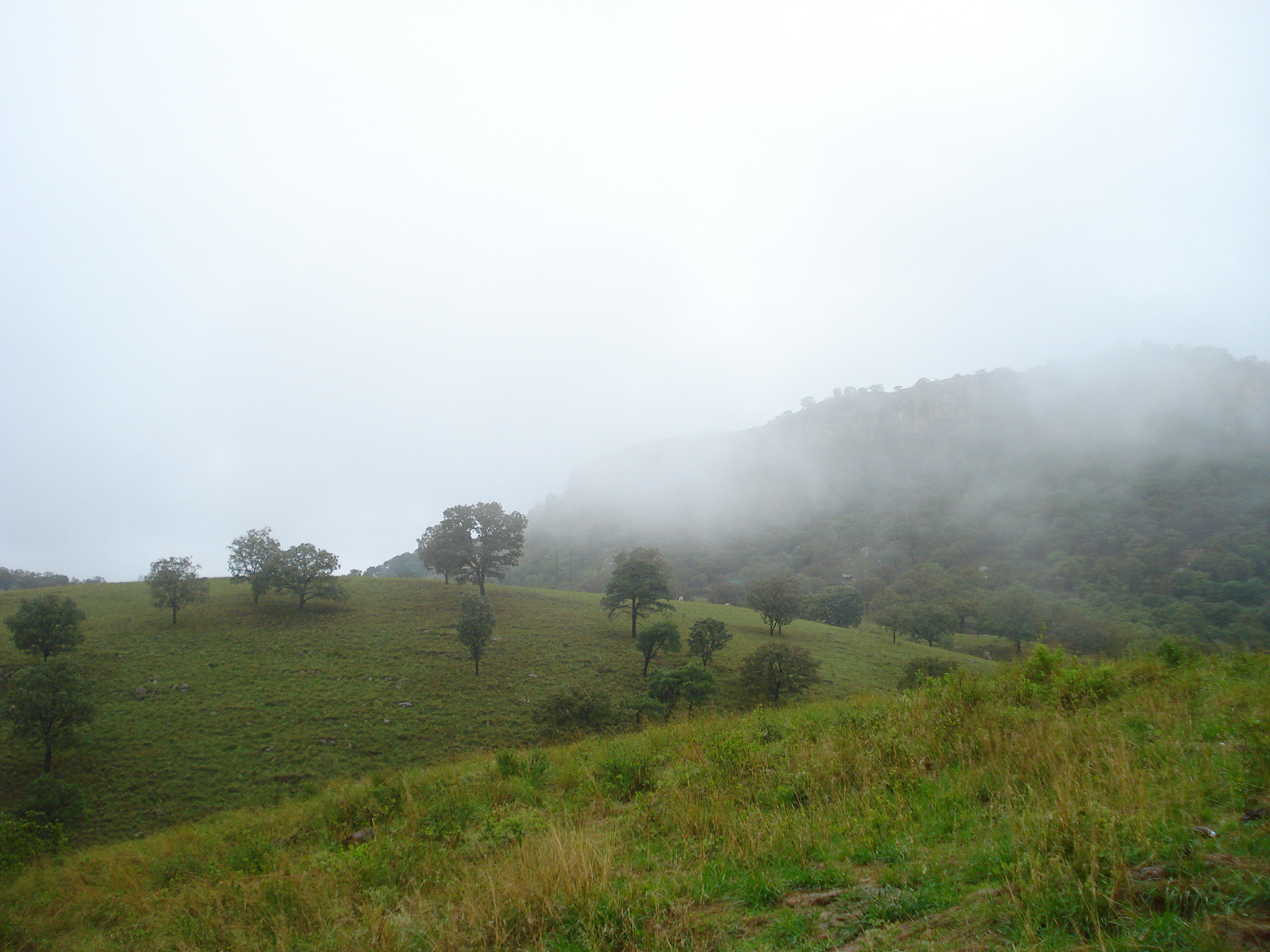 Sesotho: Muy cerca de Guadalajara se pueden apreciar estos hermosos paisajes.